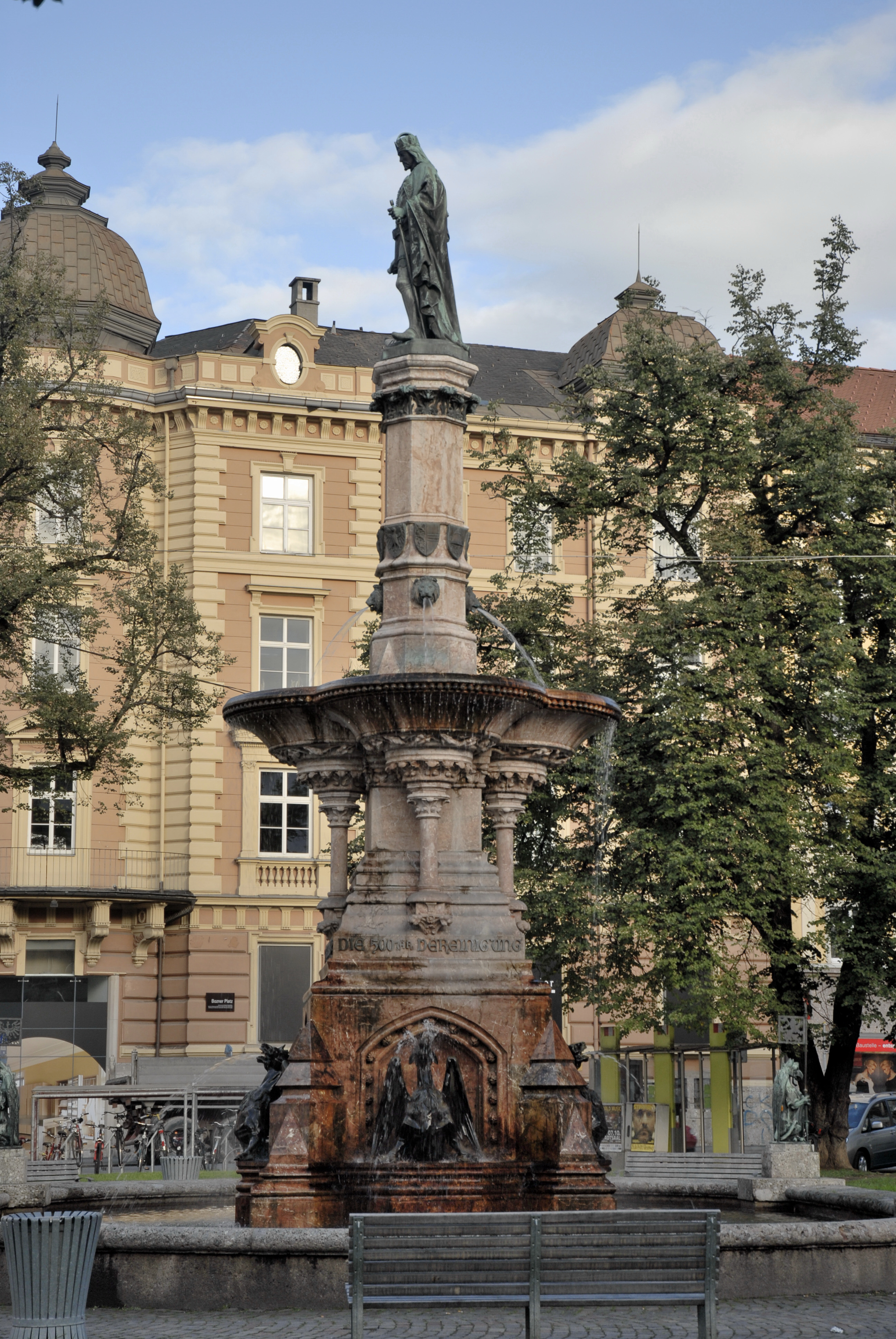 Innsbruck, Boznerplatz, Rudolfsbrunnen